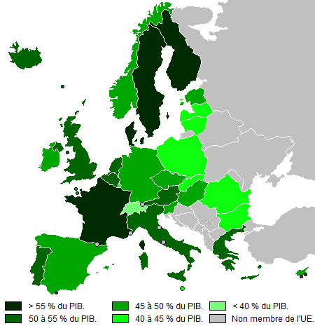 Cette carte illustre par le biais d'un code couleur l'importance relative des dépenses publiques dans la production nationale pour les différents pays de l'Union Européenne.